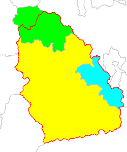 Hunyad vármegye határainak kiterjesztése az 1876-os megyerendezés során